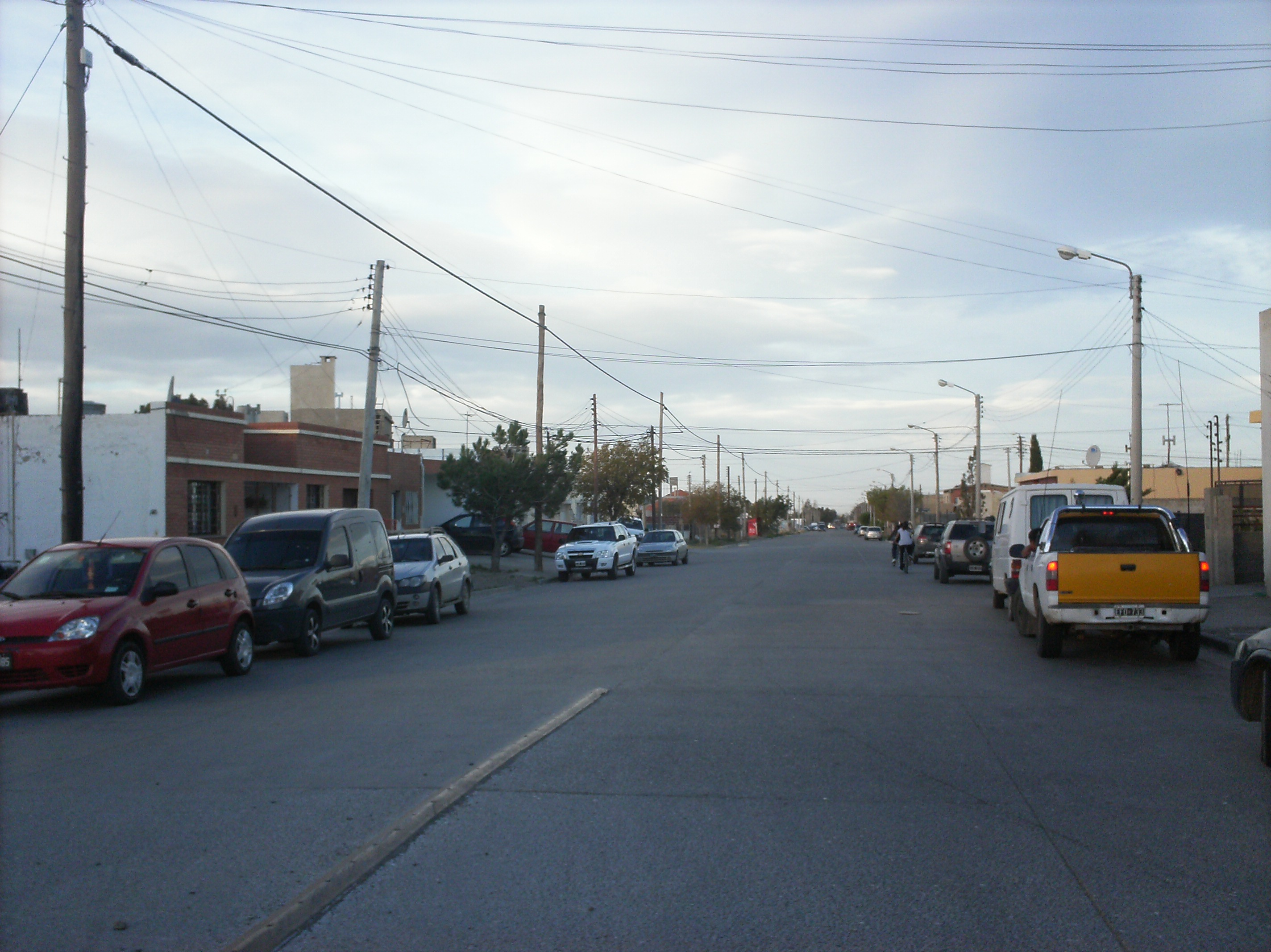 la aveida principal del barrio